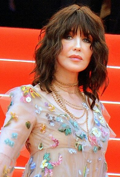 Isabelle Adjani au festival de Cannes.